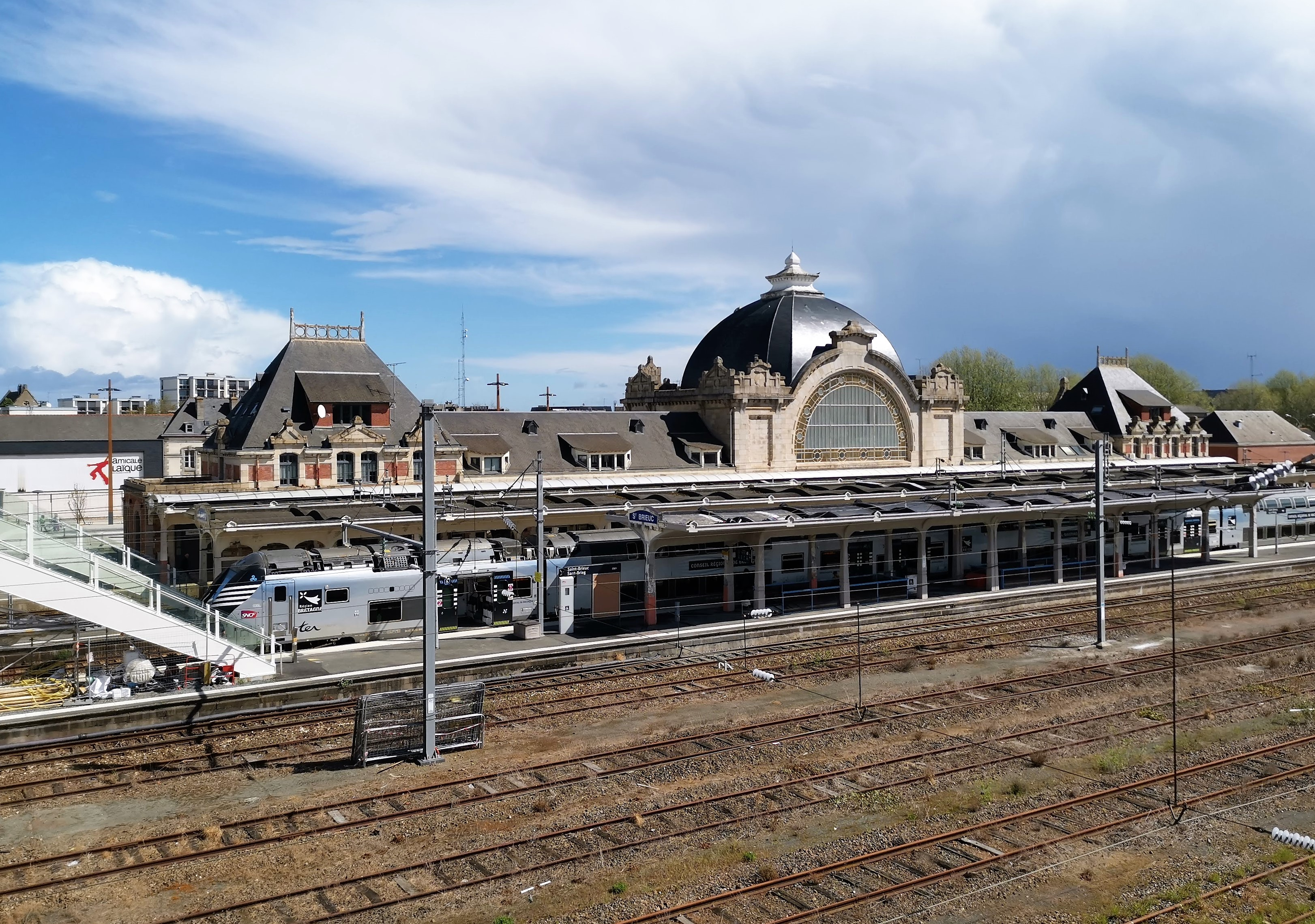 La gare SNCF à Saint-Brieuc (Côtes-d'Armor [22]). Face arrière, vue depuis la passerelle piétonne